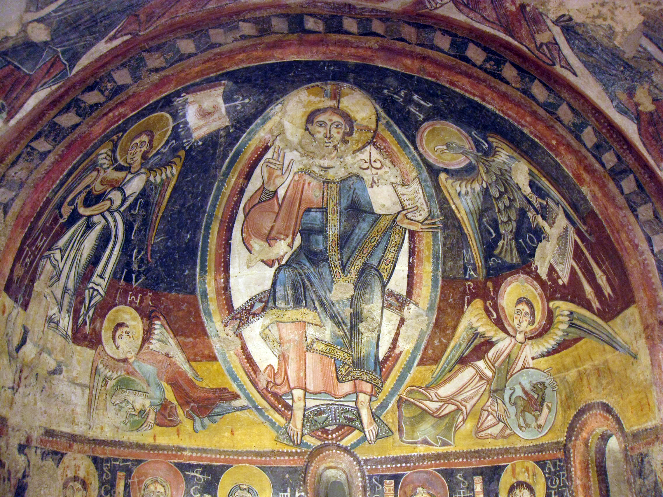 Palau Nacional (Barcelona)